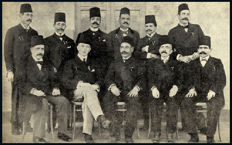 الخطاط محمد جعفر بك -أول الجالسين من الجهة اليسرى- مع أعضاء هيئة التدريس في دار العلوم